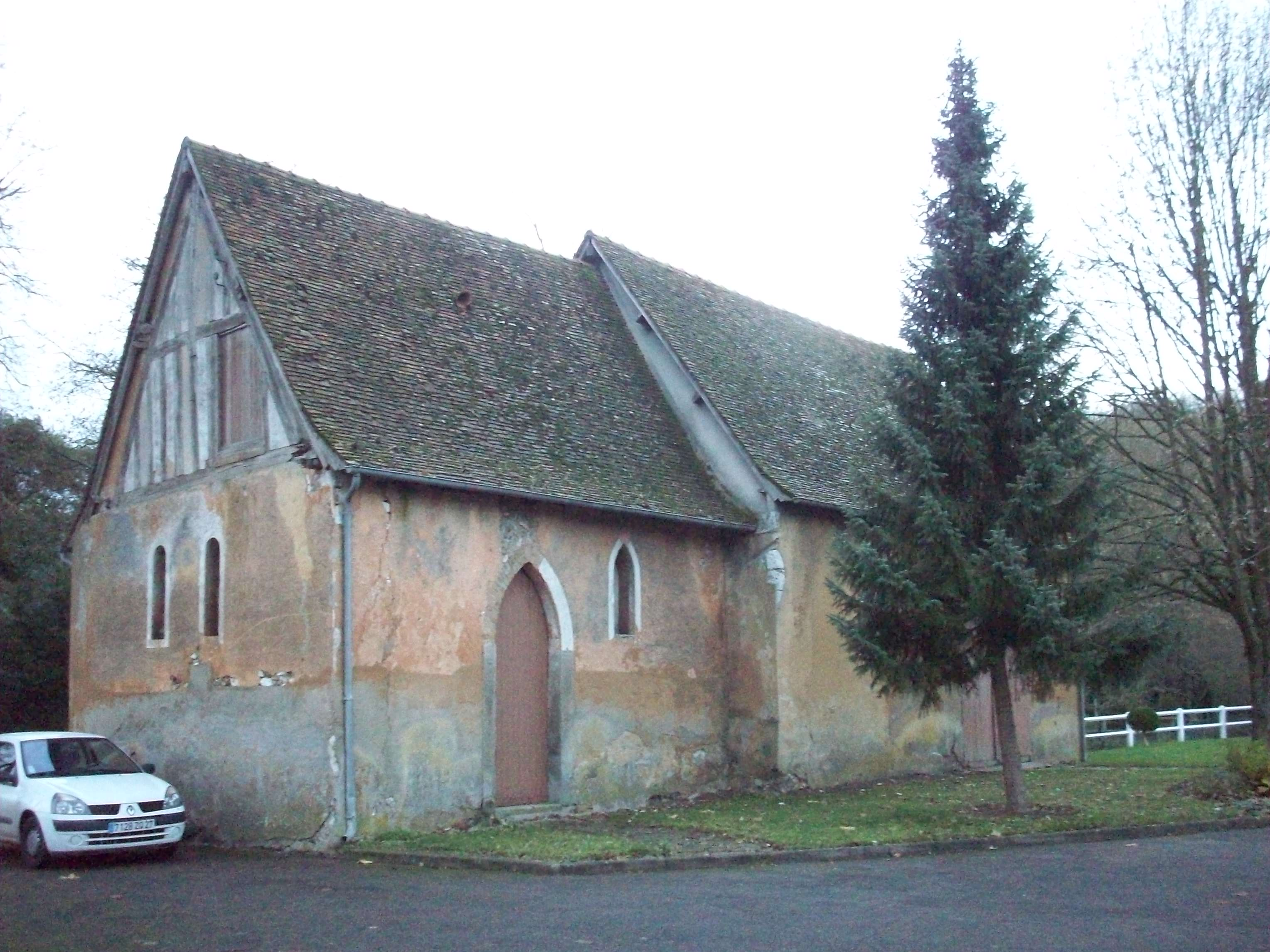 Ancienne église Saint-Michel, intégrée aujourd'hui dans l'enceinte de la maison de retraite Saint-Michel, au hameau de Transières, à Charleval.